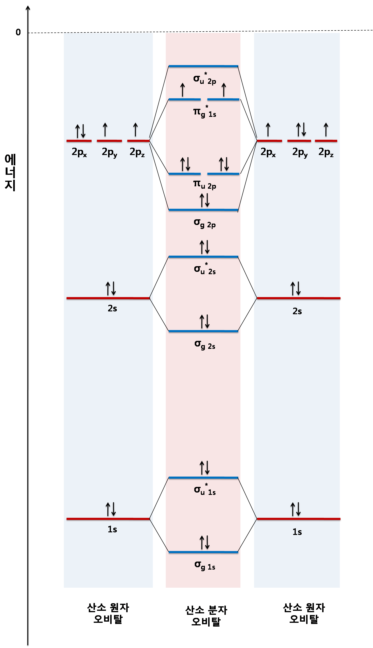 O2 분자 궤도 도표